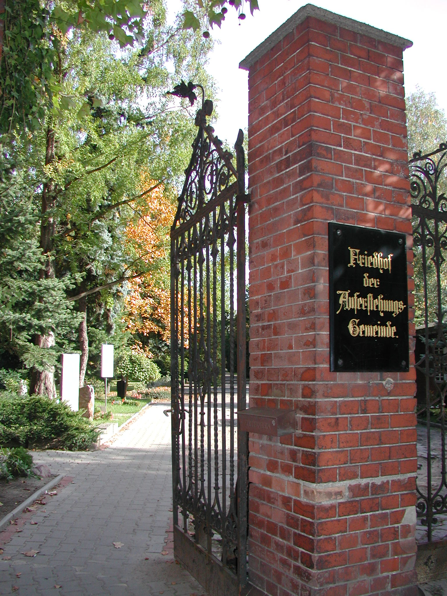 Straße im Ortsteil Berlin-Weißensee: Auferstehungs-Gemeinde, Friedhof, Eingang Herbert-Baum-Straße